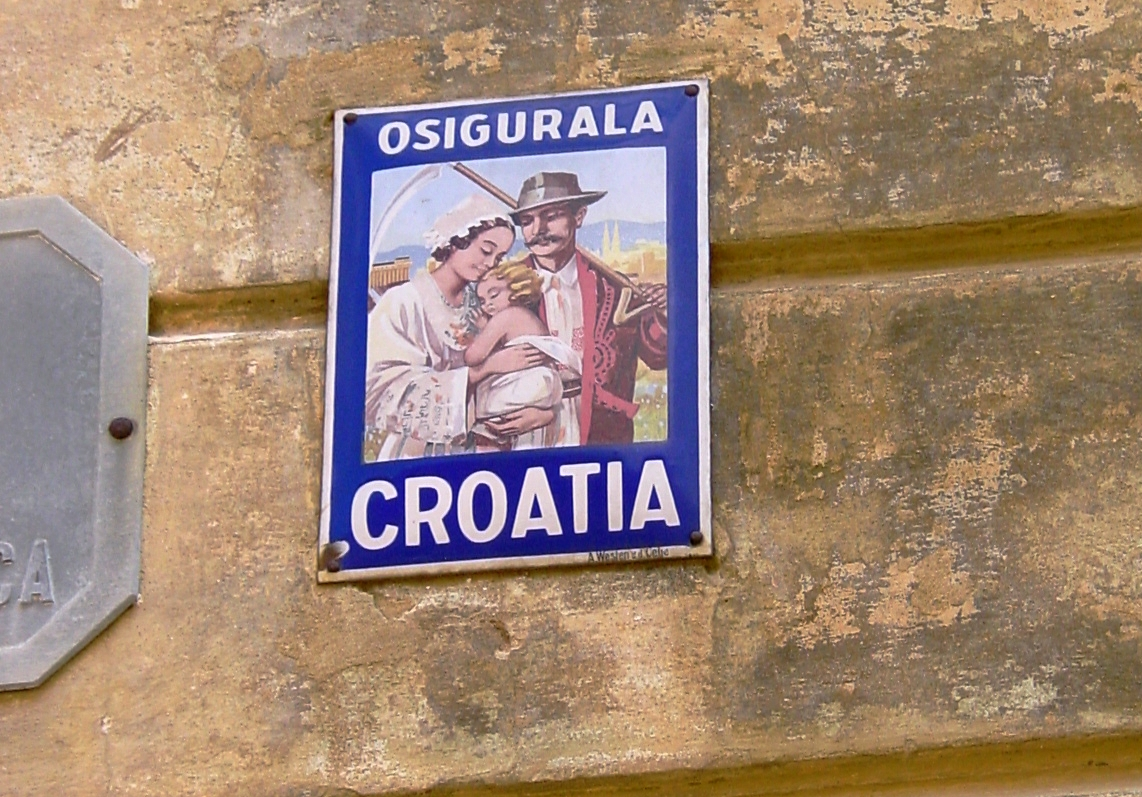 Ancienne plaque en émail d'une compagnie d'assurance dans une rue de la vieille ville, Zagreb, Republika Hrvatska (Croatie). Autrfois ces plaques étaient fixées sur les maisons assurées par cette entreprise